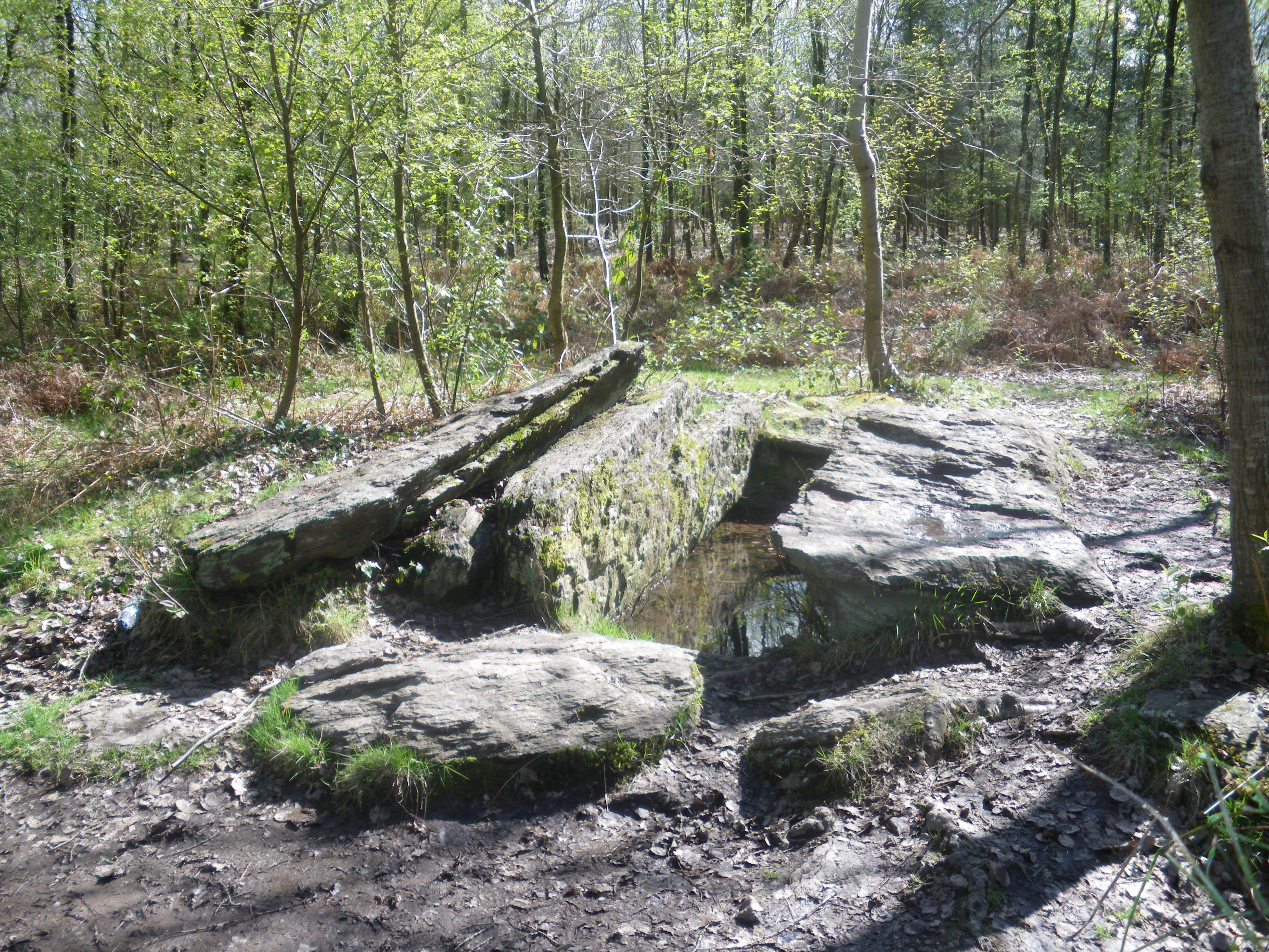 Site mégalithique de la forêt de Brocéliande surnommé "Le Tombeau des Géants".